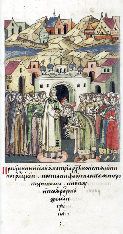 ЛИЦЕВОЙ ЛЕТОПИСНЫЙ СВОД Преосвященный Исайя, патриарх Константиноградский, поставил Феогноста митрополитом Киеву и всей Русской земли, грека.